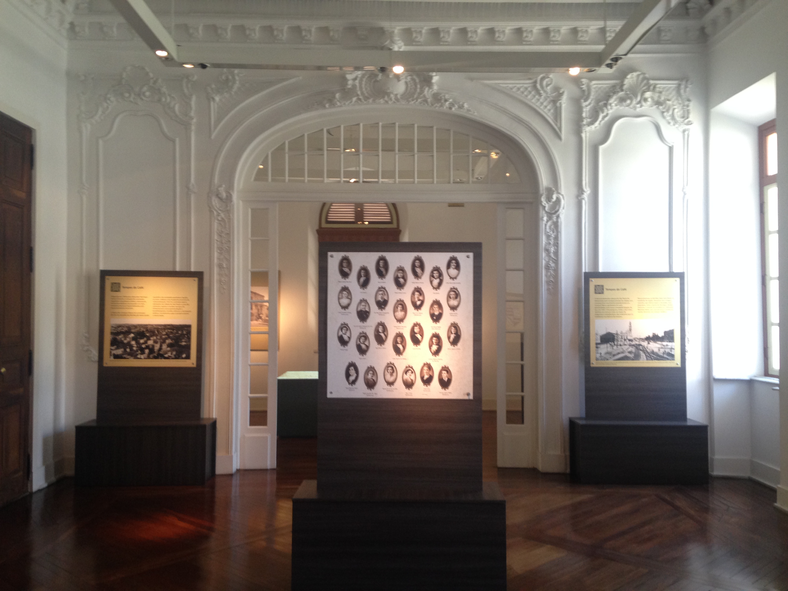 Parte interna Casarão Alameda Cleveland, sala térrea com fotos da exposição do museu da Energia Elétrica, São Paulo Brasil.